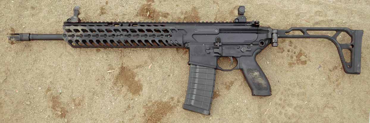 SIG-MCX-Rifle